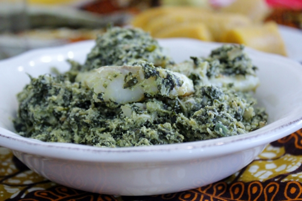 ndole à la morue This is an image of food from Cameroon